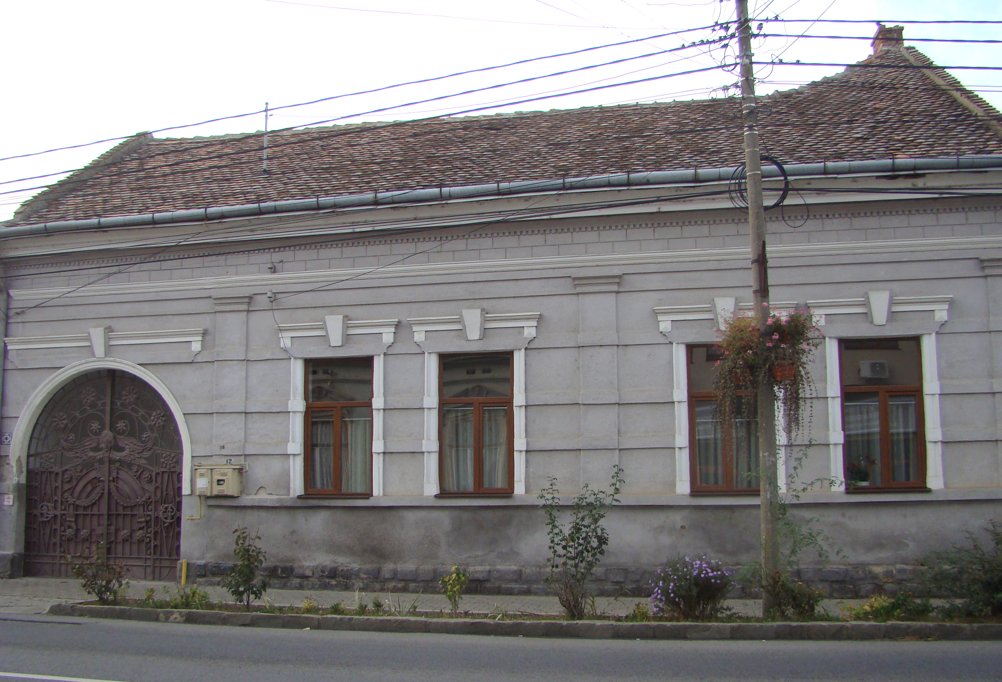 Ansamblul urban „Bd. Ferdinand I”, municipiul Alba Iulia, Bd. Ferdinand I 1-35, 2-26 sf. sec. XIX